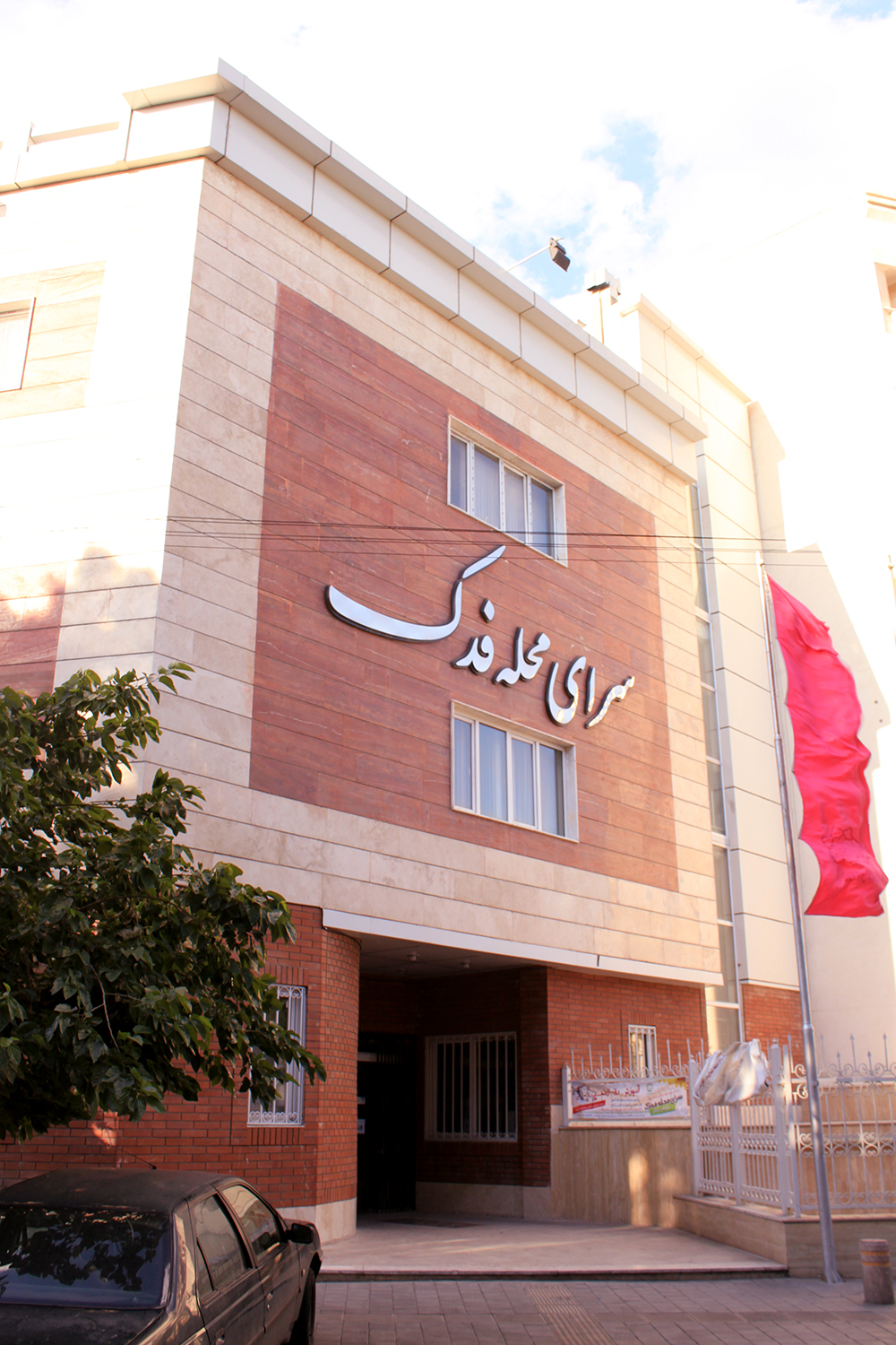 سراى محله‌ى فدك در ميدان هلال احمر